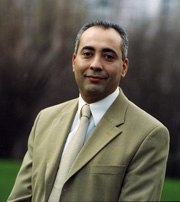 Portrait d'Abdel Sadi, homme politique français, premier adjoint au maire de Bobigny, conseiller général du canton de Bobigny (Seine-Saint-Denis).